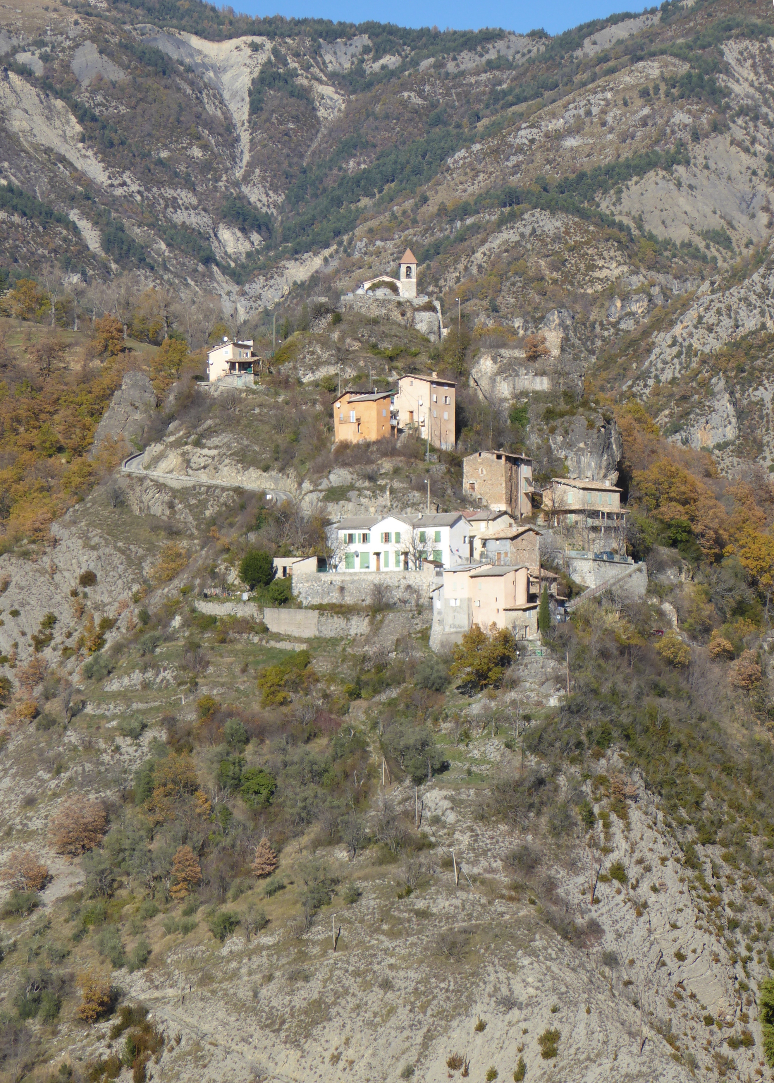 Vu de La Faille